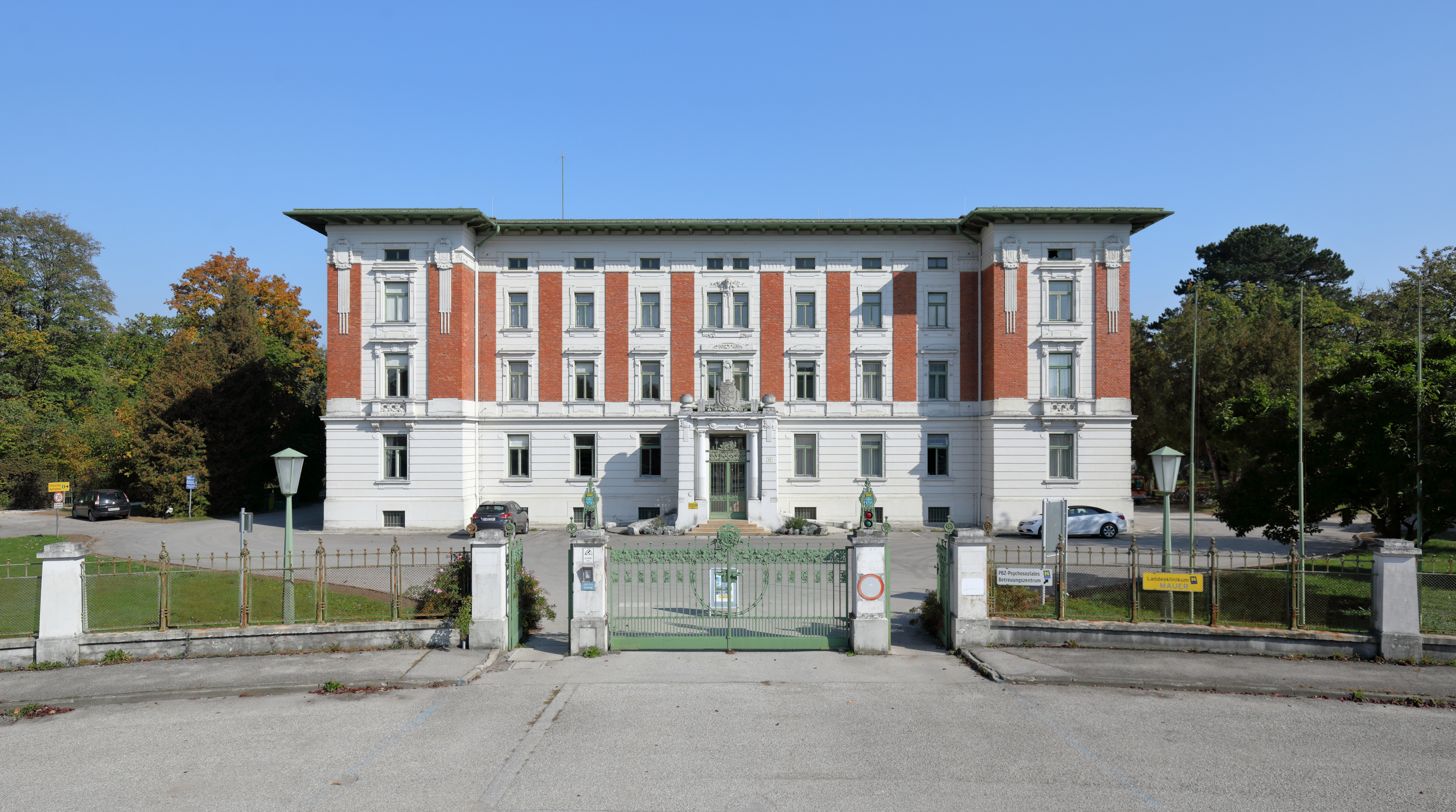 Das Haupt- bzw. Verwaltungsgebäude des Landesklinikums in Mauer, ein Ortsteil der niederösterreichischen Stadt Amstetten.Das niederösterreichische Landeskrankenhaus für Psychiatrie und Neurologie Mauer bei Amstetten wurde von 1898 bis 1902 nach Plänen von Carlo von Boog als Kaiser-Franz-Joseph-Landes-, Heil- und Pflegeanstalt Mauer-Öhling auf einem etwas 100 ha großem Areal in Pavillonstil errichtet.